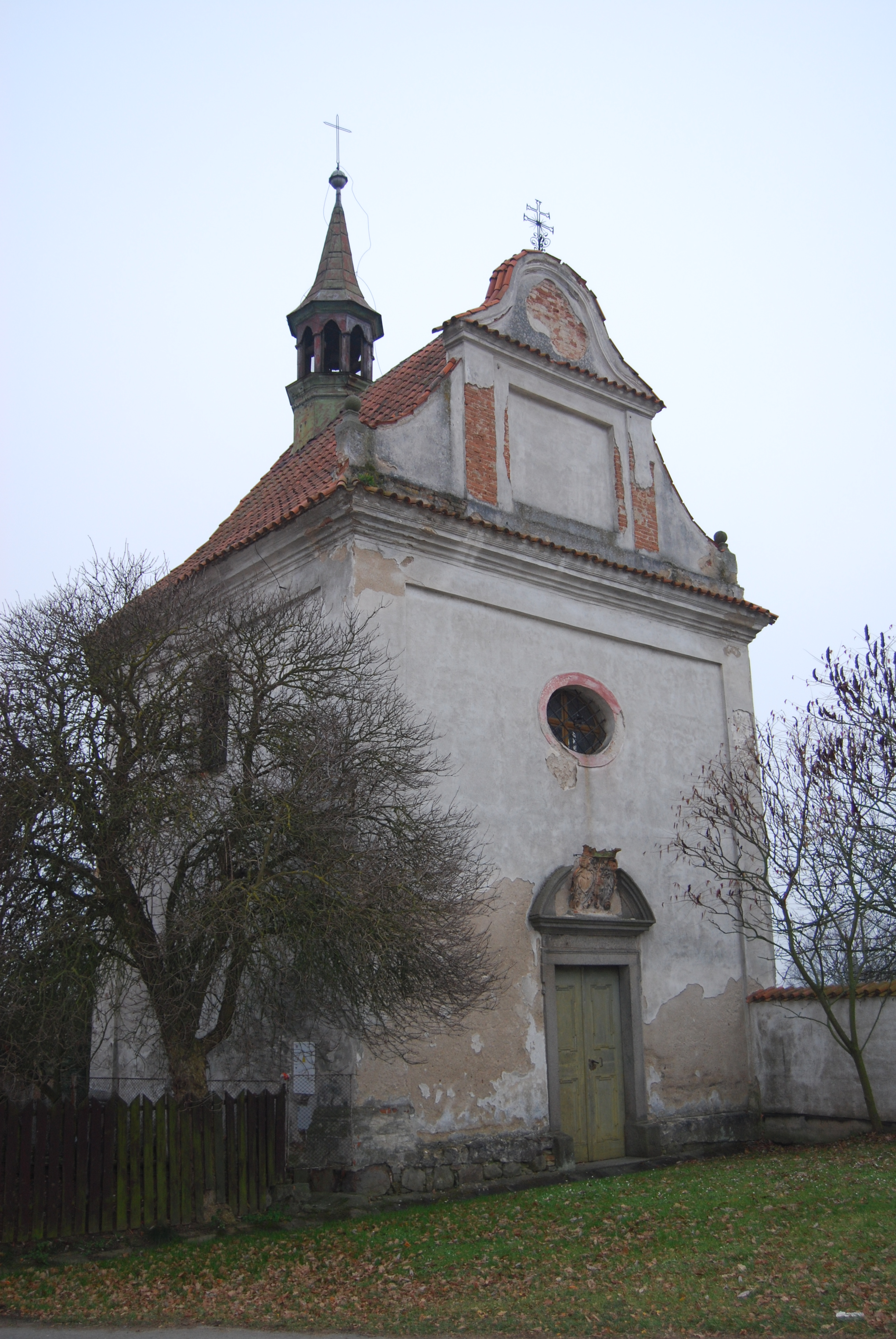 Kaple sv. Jana Nepomuckého v obci. Horosedly. Okres Písek. Česká republika.